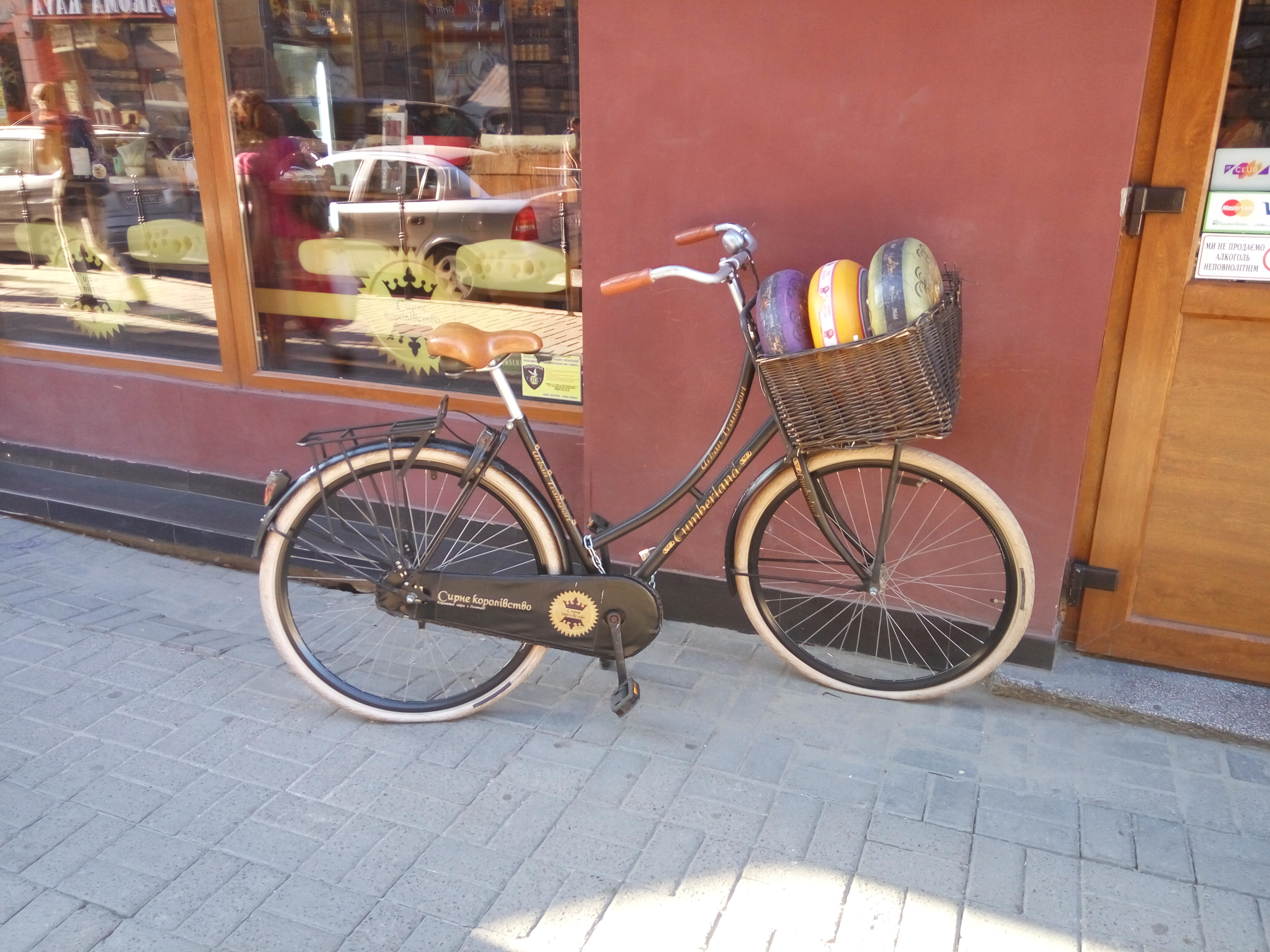 Велосипед в якості реклами магазину сирів